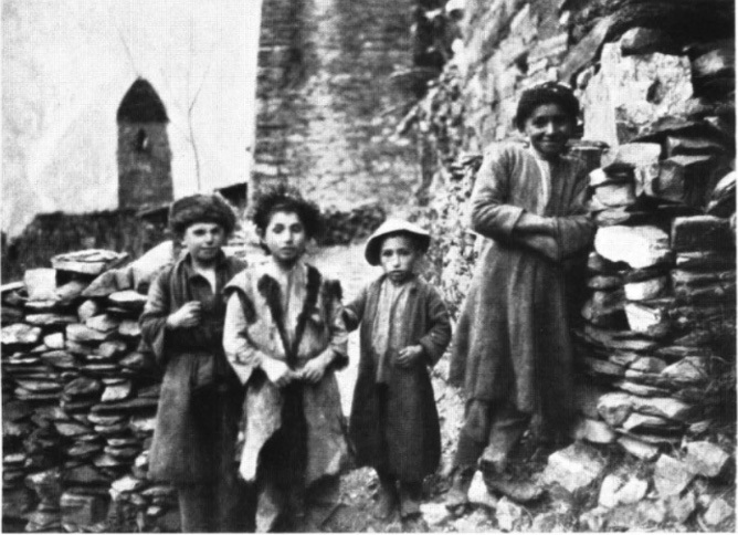 Чеченские мальчики из Цекэли, Майста